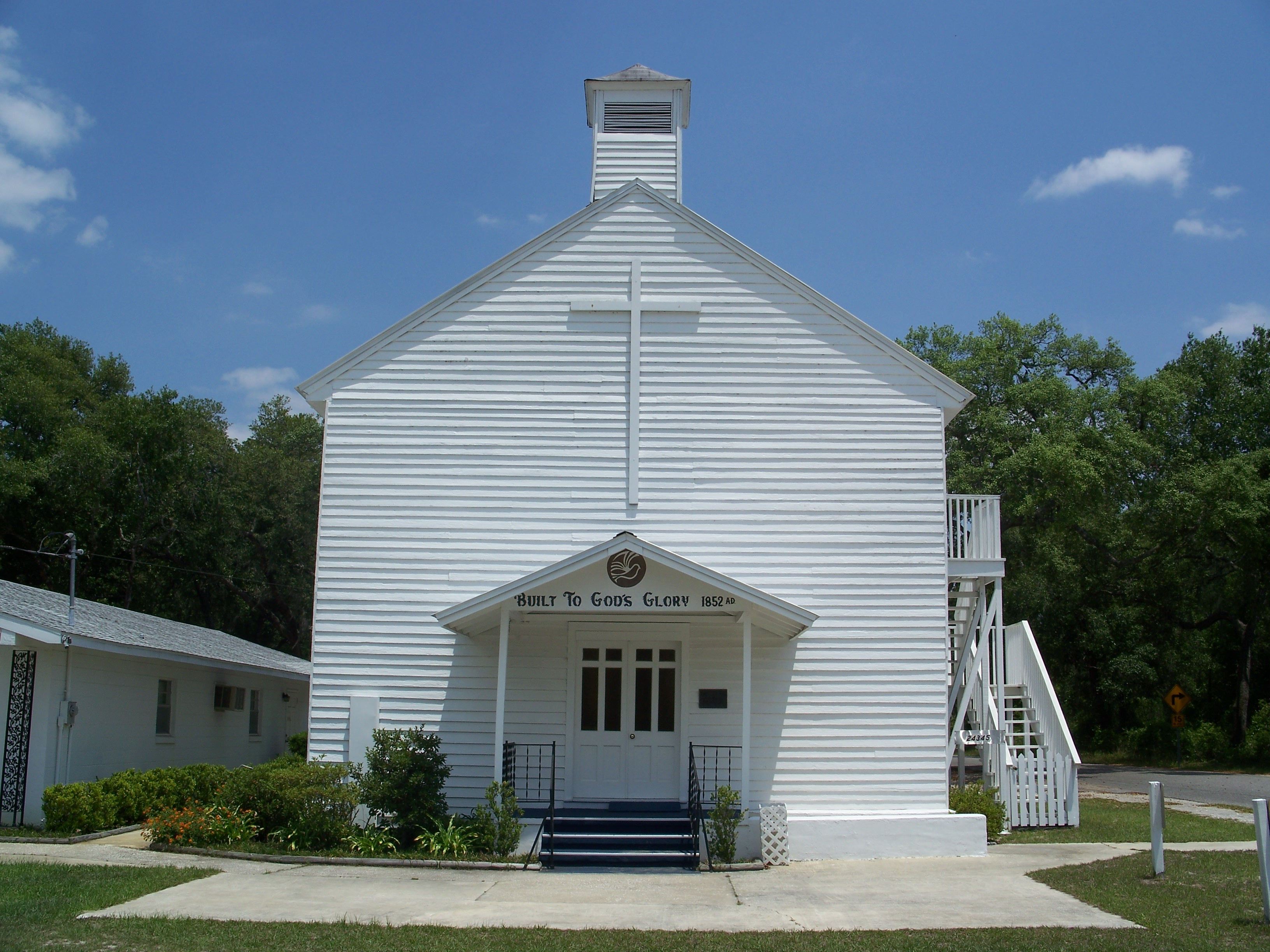 Orange Springs Methodist Episcopal Church, in Orange Springs, Florida